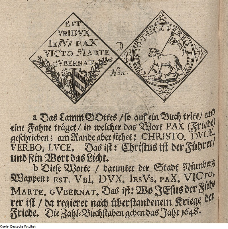 Original image description from the Deutsche Fotothek Münze & Gedenkmünze & Schaumünze & Medaille & Wappen & Lamm